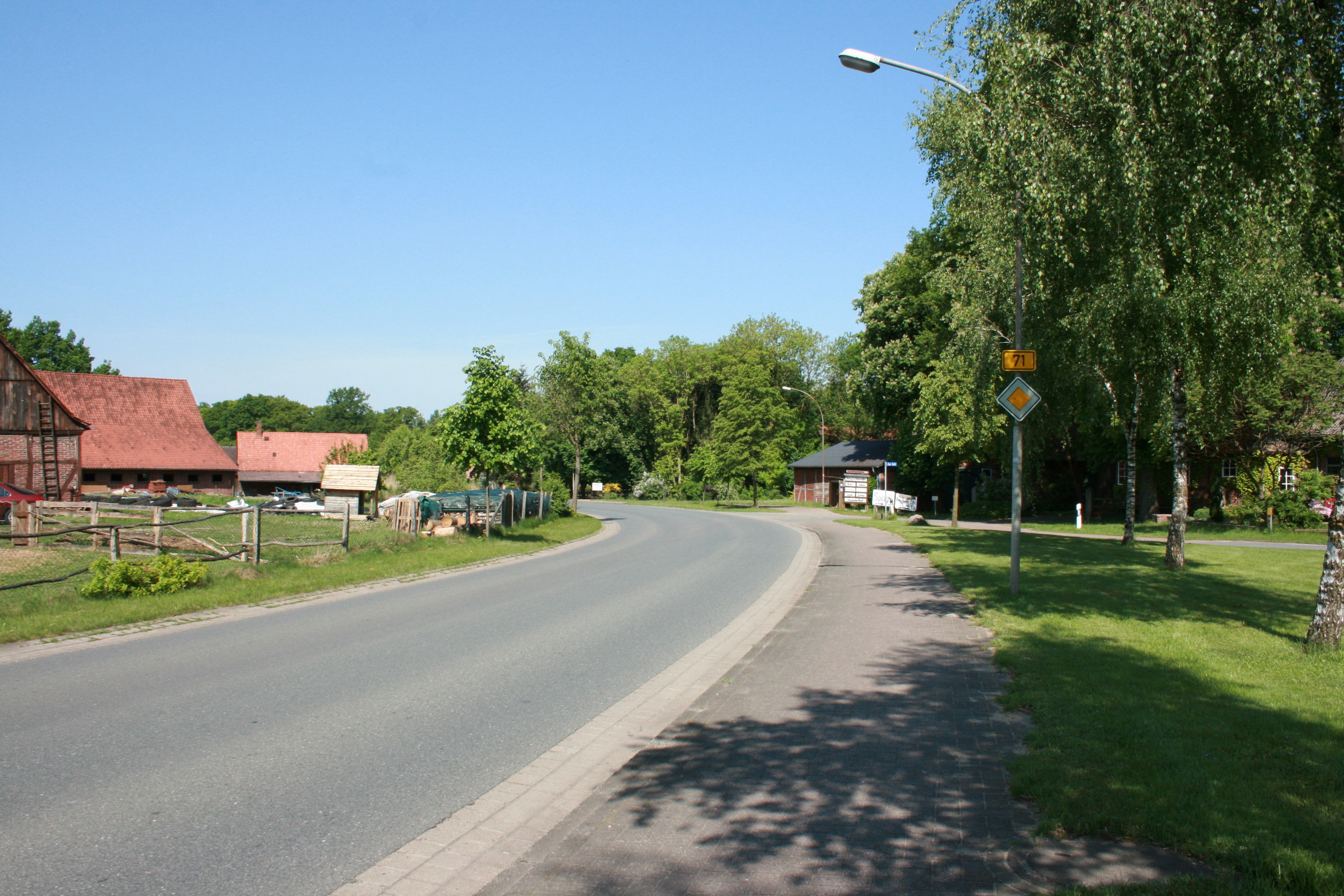 Brochdorf, Ortsteil vom Neuenkirchen (Lüneburger Heide)